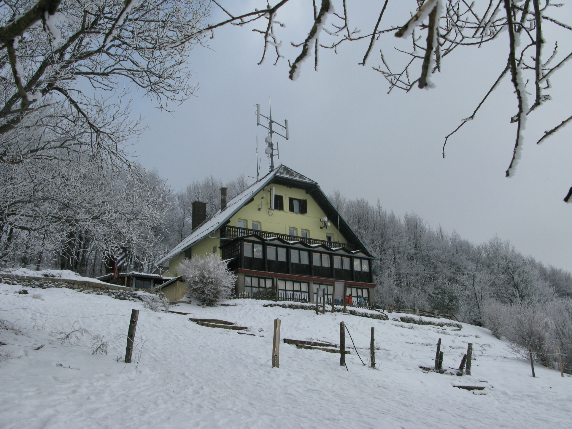 Planinski dom na Veliki Slivnici